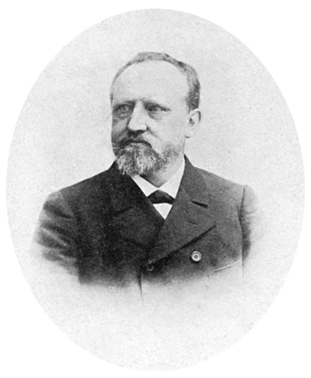 Commerzien-Rath Carl Spindler als Mitglied des Geschäftsführenden Ausschusses der Gewerbe-Ausstellung.